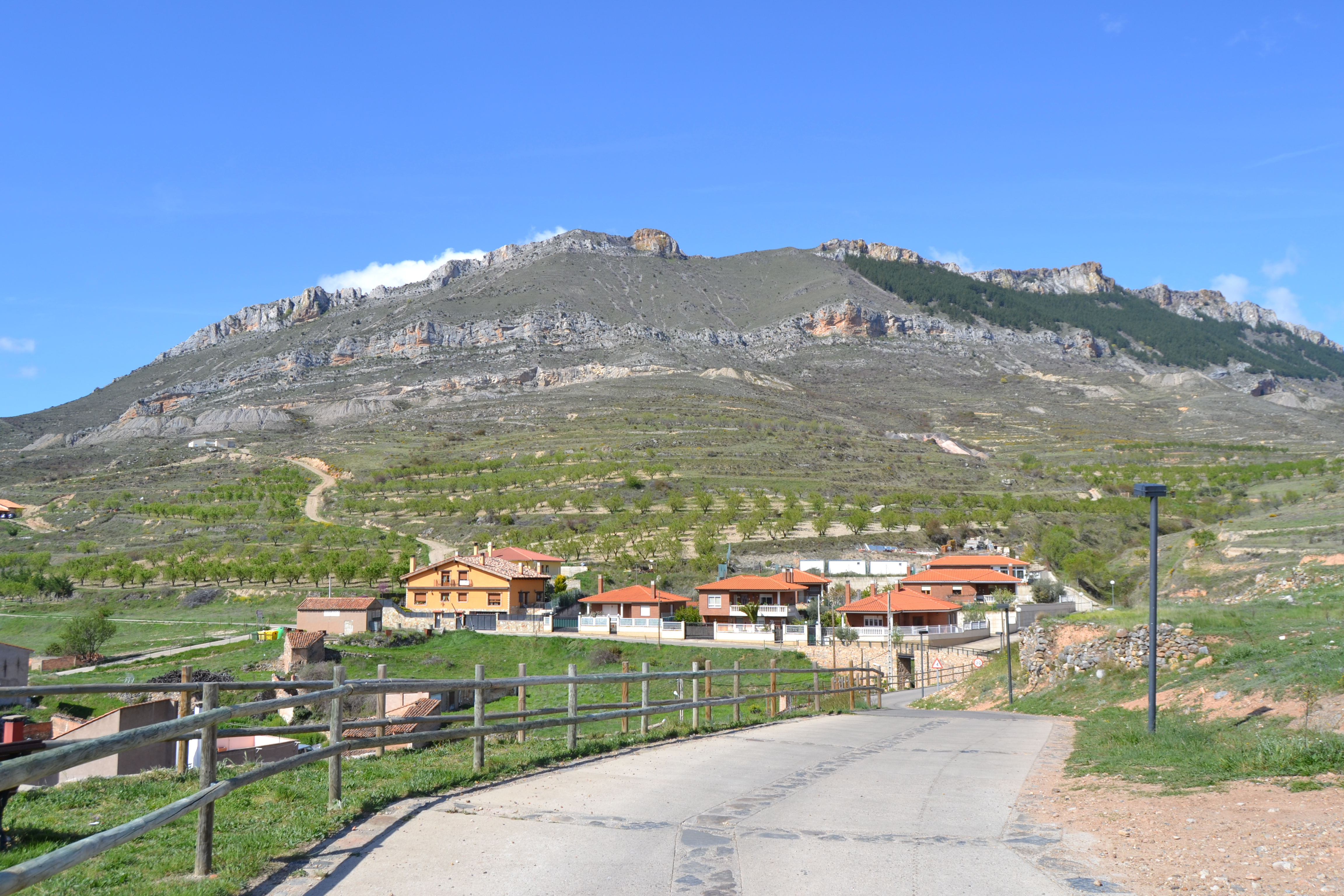 Vista de la Sierra de Peñalmonte desde Préjano, La Rioja (España). This is a photography of a Special Area of Conservation in Spain with the ID: ES0000065. Natura2000 entry, EEA entry